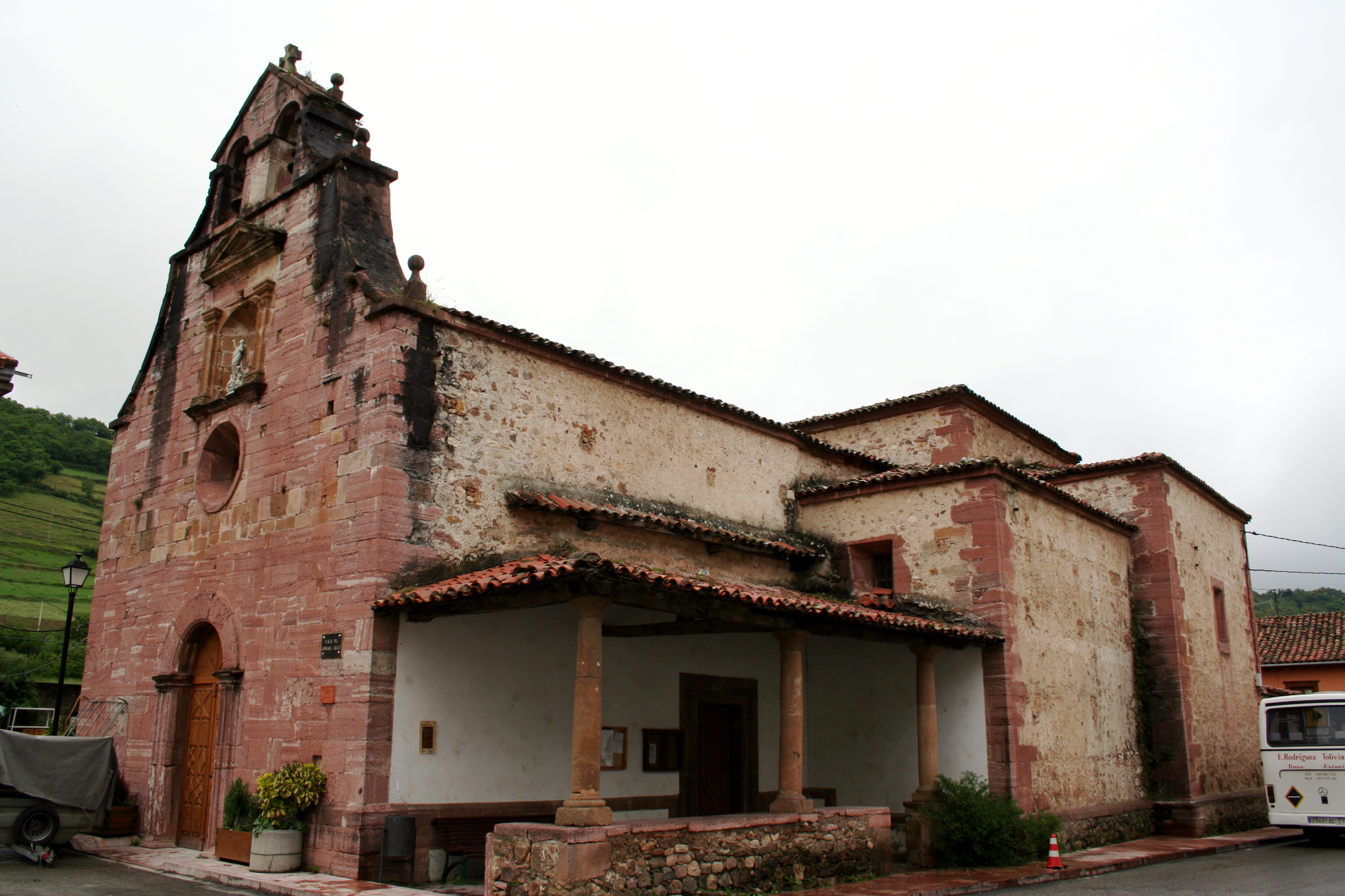 Iglesia de Tuña, en el concejo de Tineo en Asturias